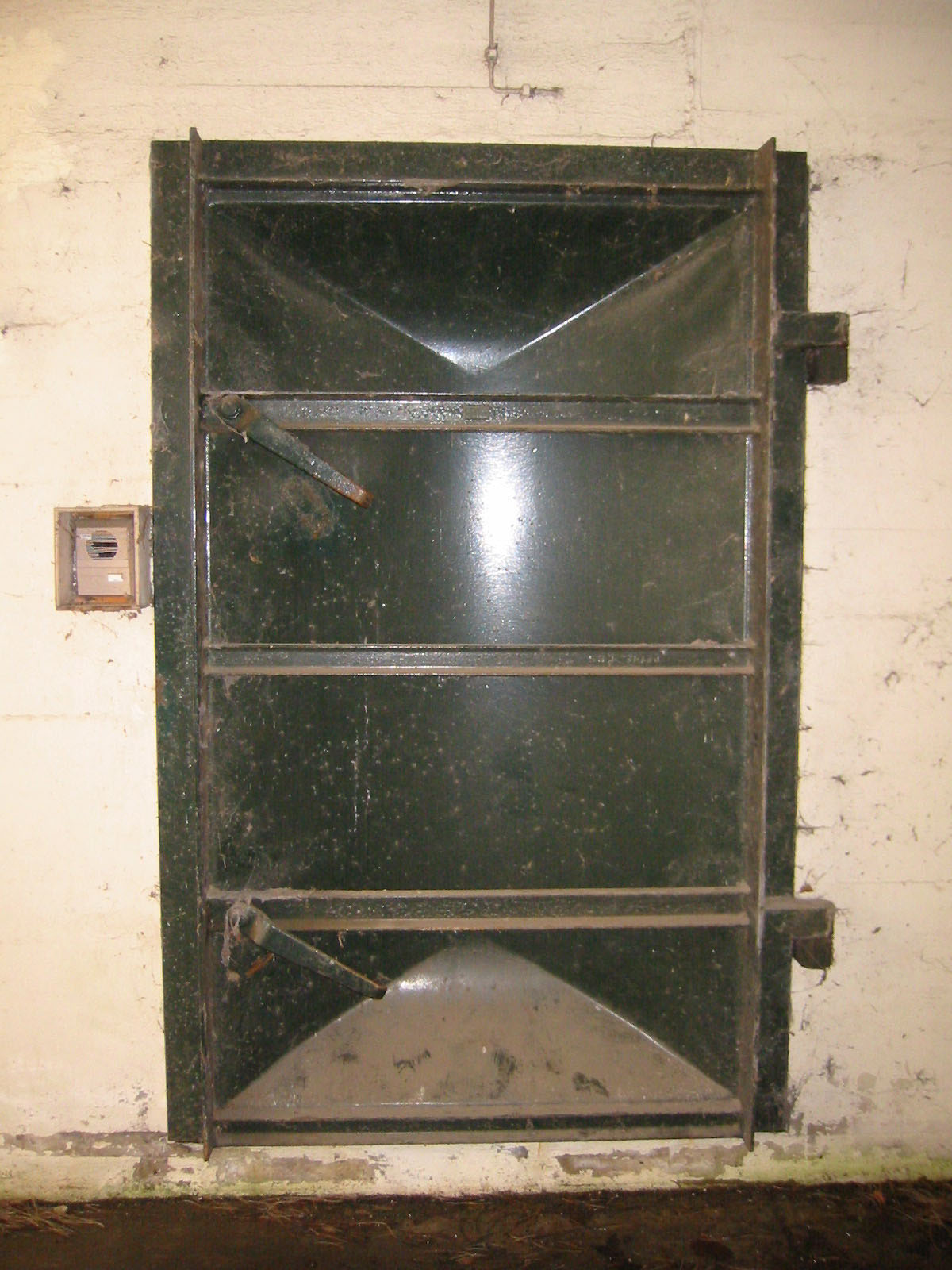 Panzertür des Vordereingangs des Bunkers des Hilfskrankenhaus Wedel